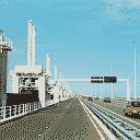 voorbeeld gif dithering, eigen foto, eigen werk.